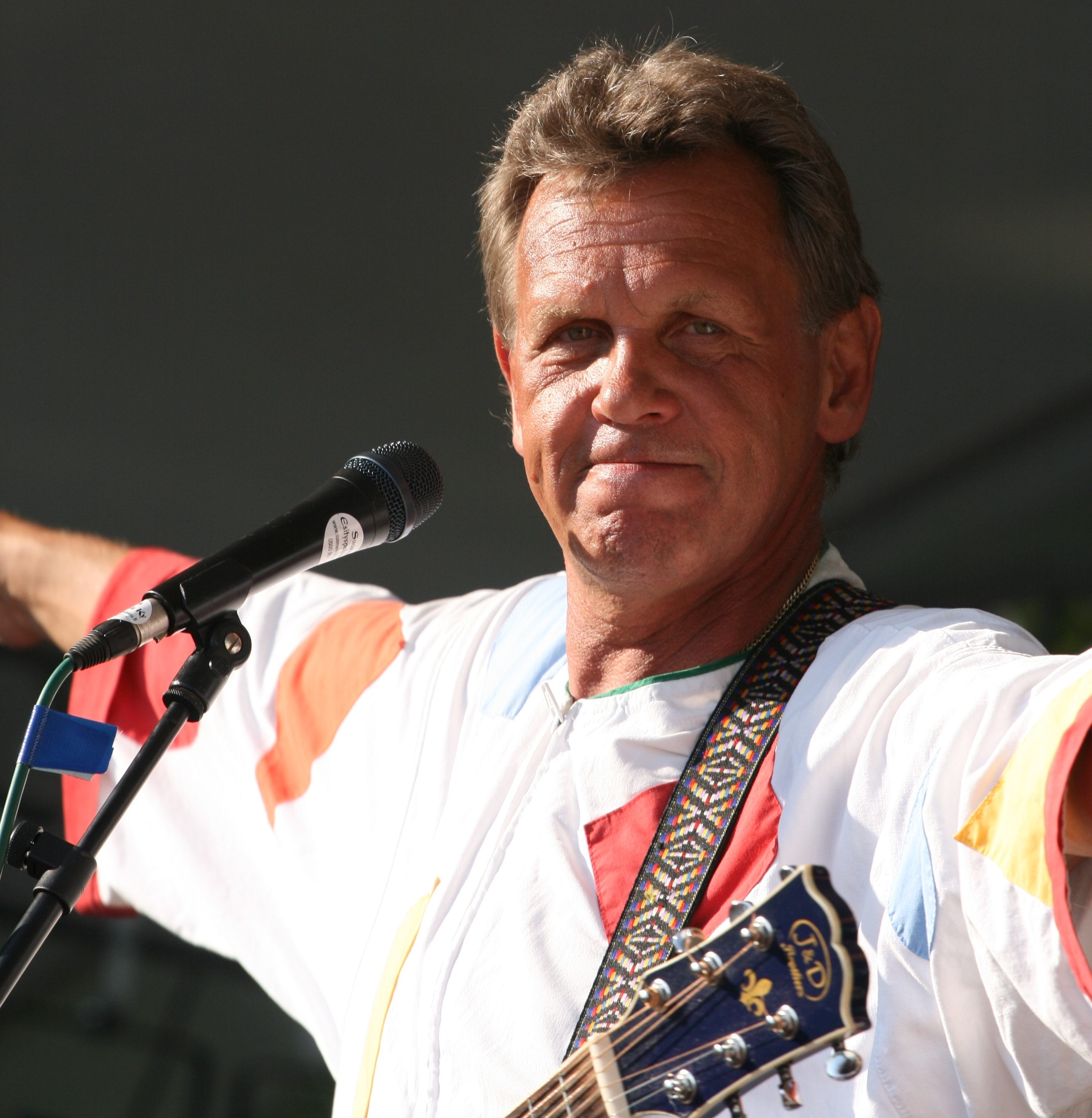 Benny Törnroos finnish singer